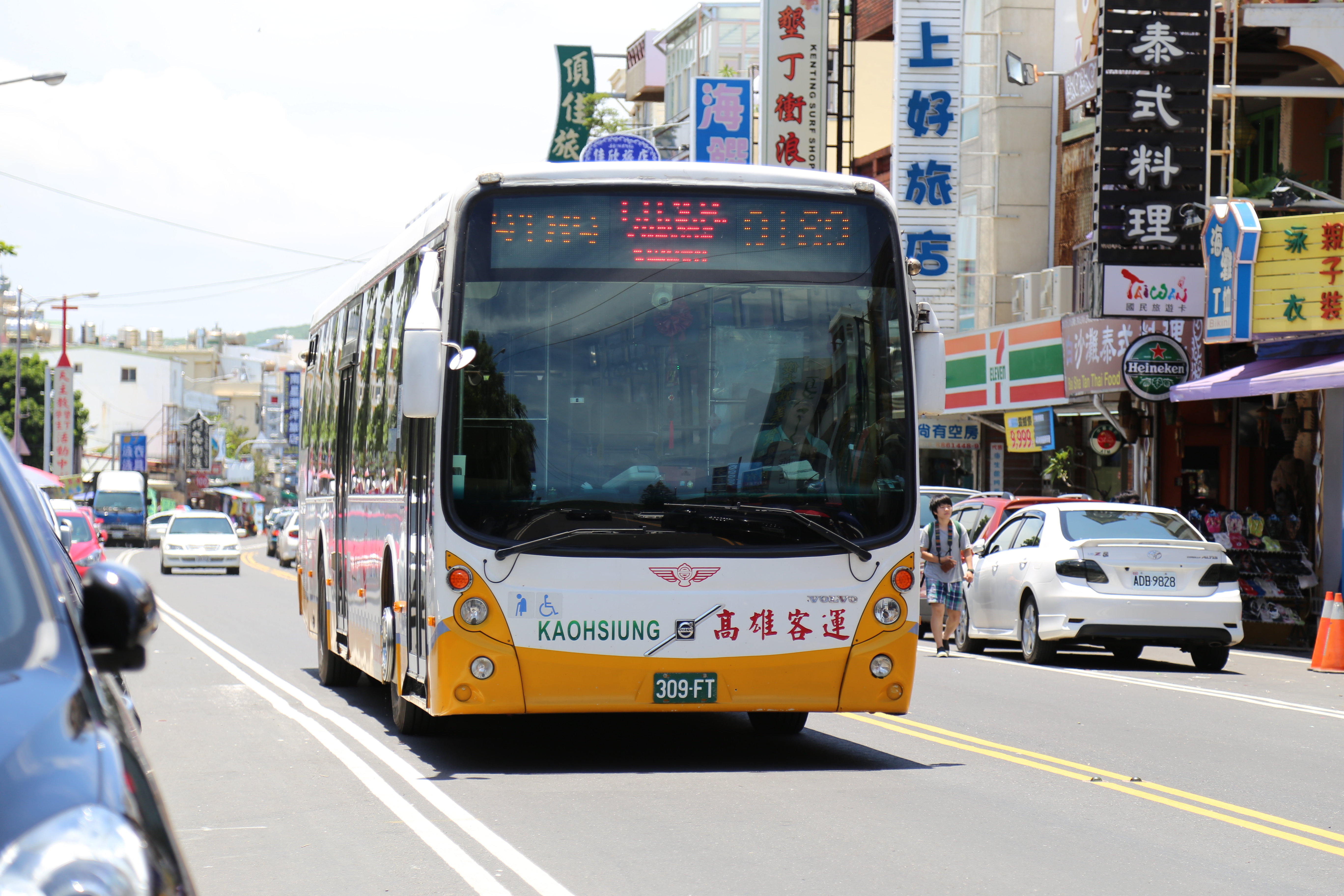 高雄客運VOLVO B7RLE大客車309-FT行駛在屏東縣墾丁大街